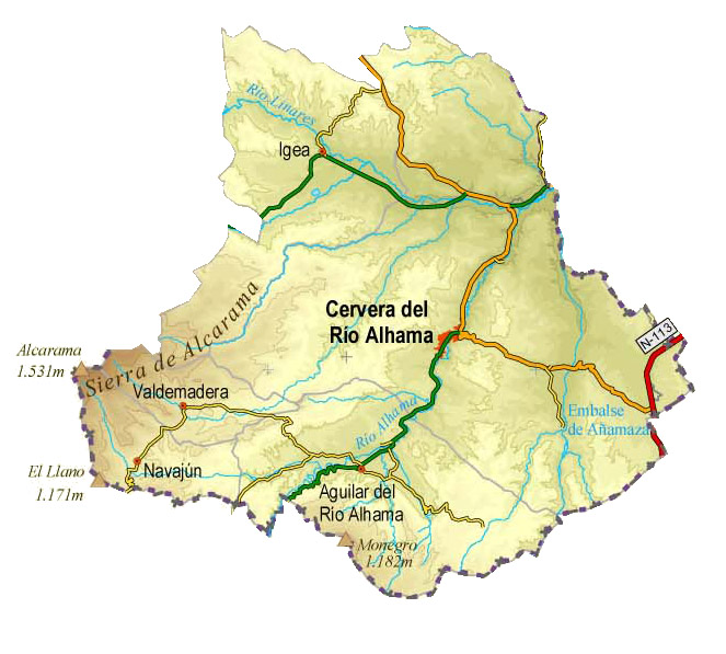 Mapa orográfico de la comarca de Cervera